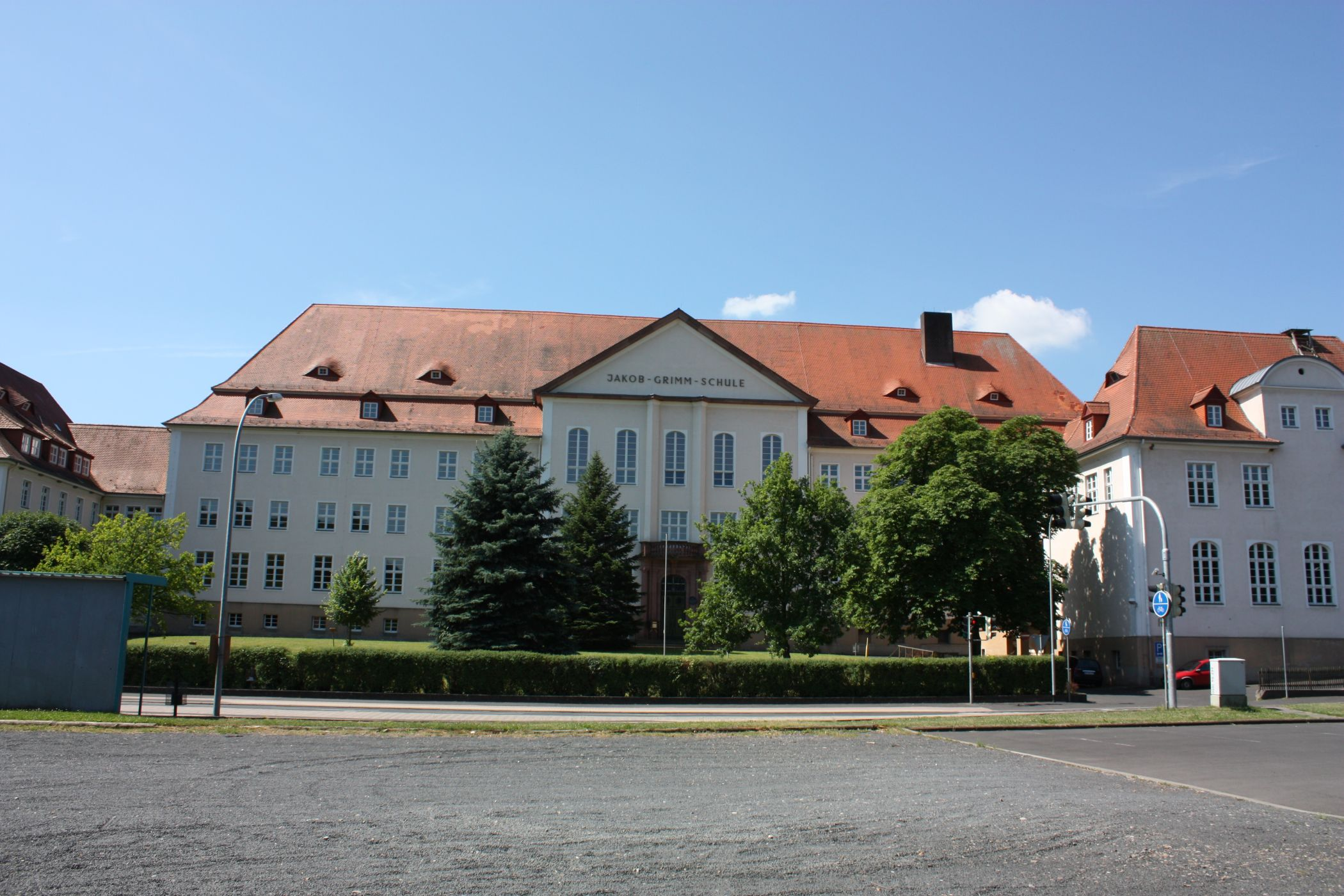 Grimm-Gymnasium in Rotenburg Fulda, Hessen, Deutschland